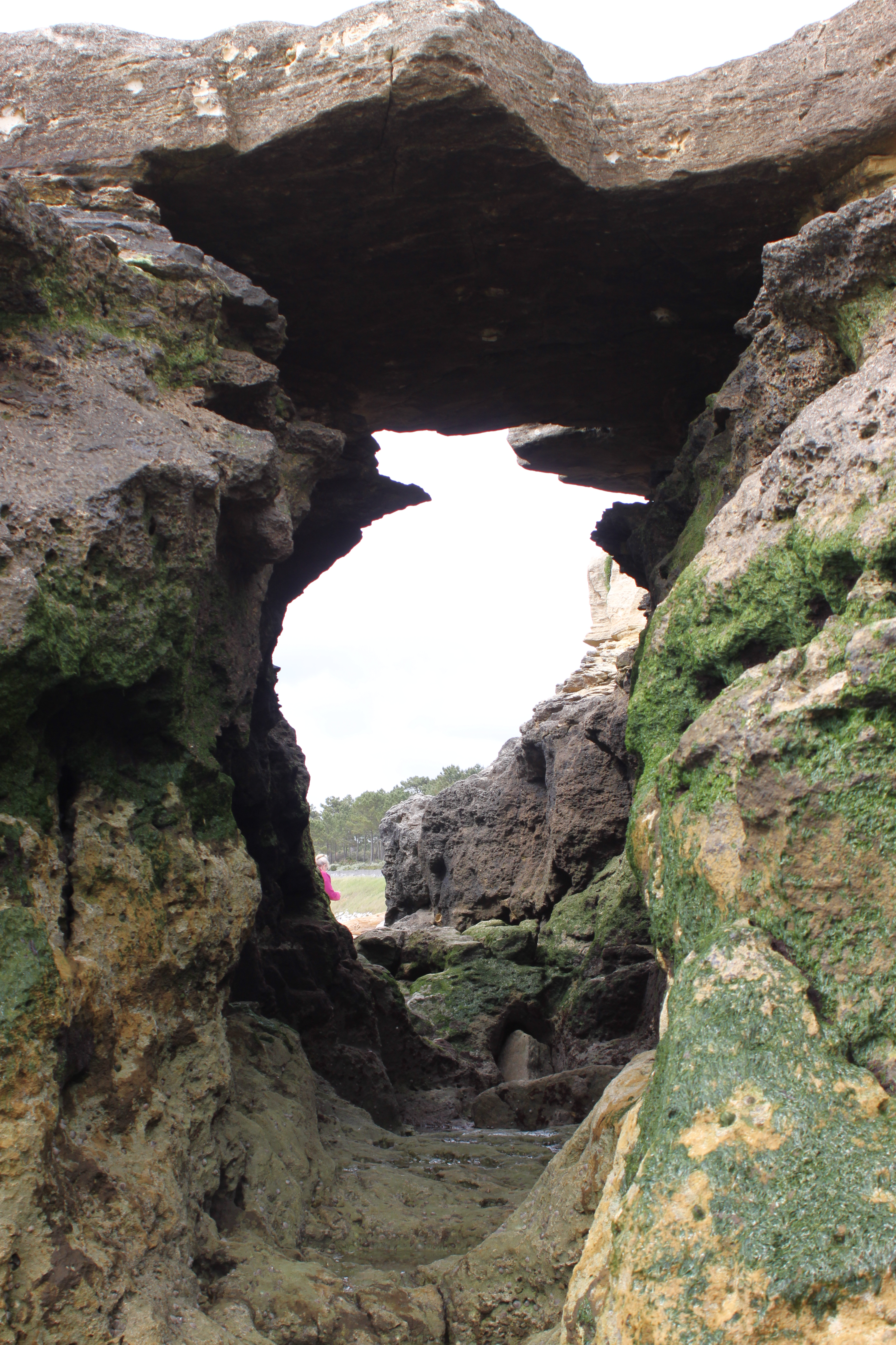 Pont du Diable, Fr-17-Saint-Palais-sur-Mer.